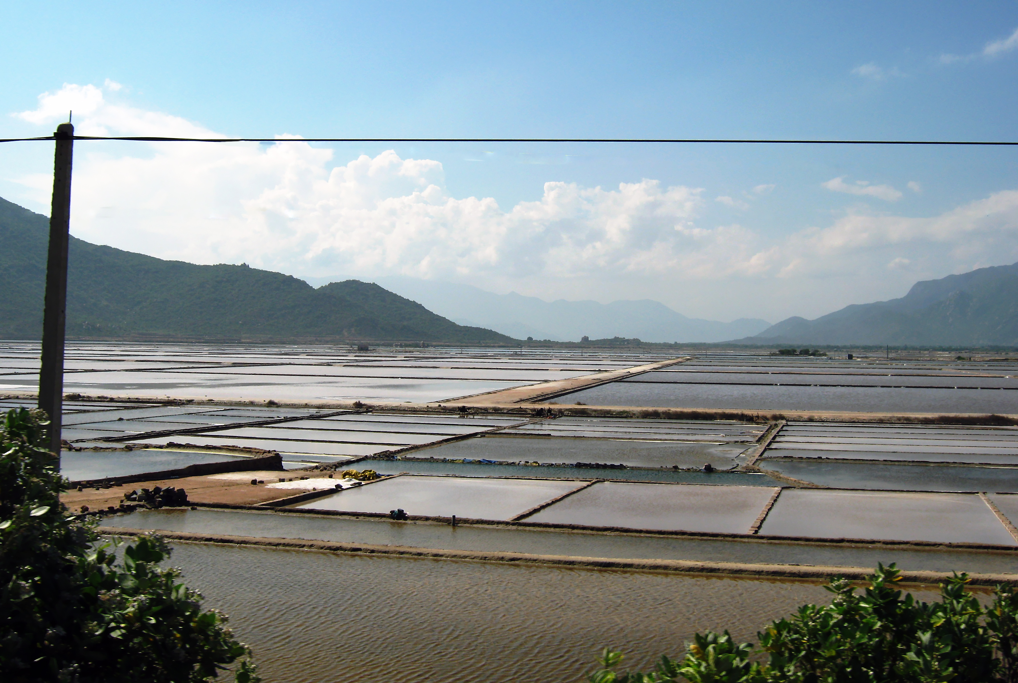 Những ruộng muối ở Phan Rang (Ninh Thuận, Việt Nam)